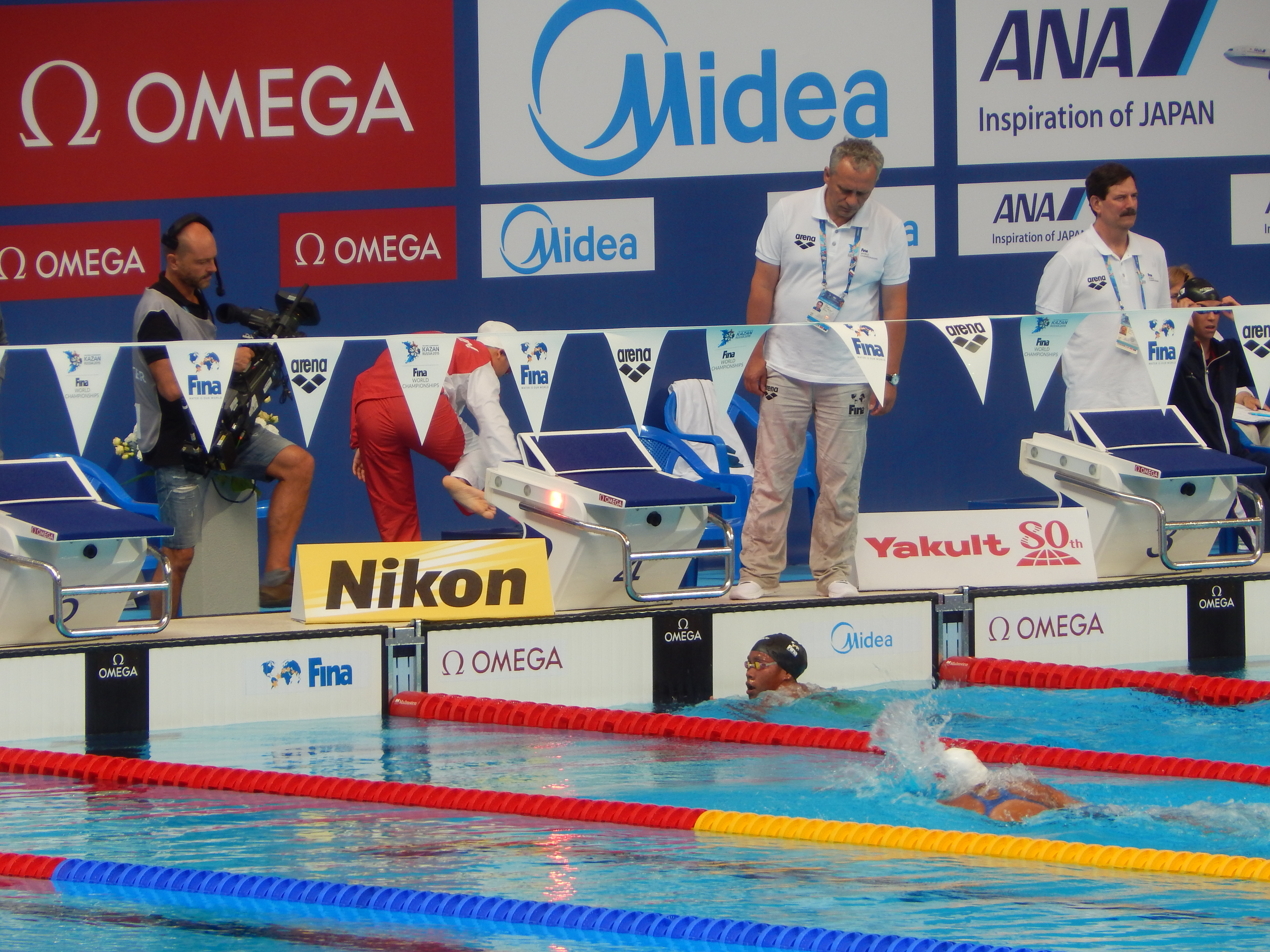 Пхиангхван Павапотако (Phiangkhwan Pawapotako) из Таиланда выигрывает предварительный заплыв на 400 м комплексным плаванием